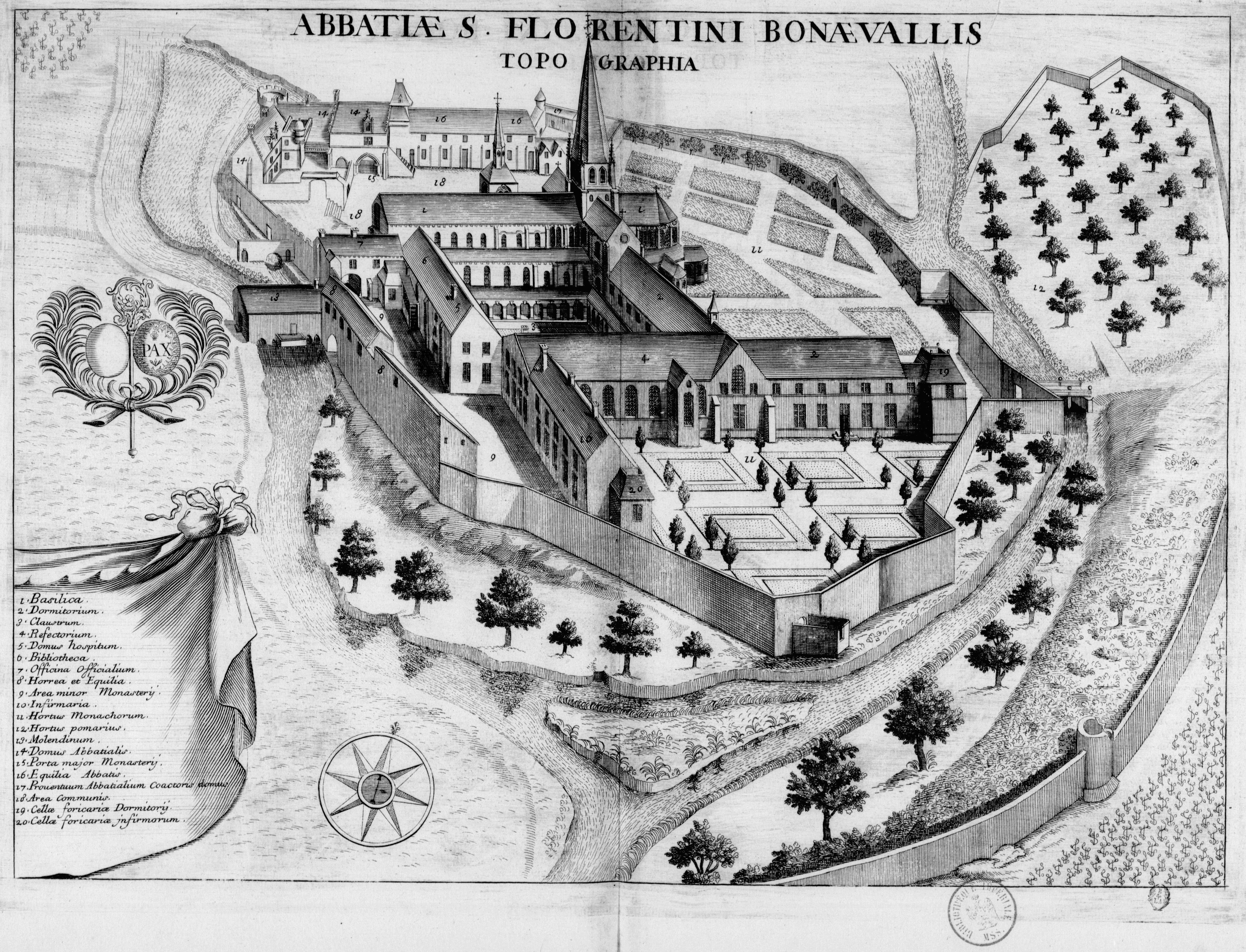 Planche gravée du 17ème siècle représentant l'abbaye Saint-Florentin de Bonneval, dans le livre Monasticon Gallicanum.